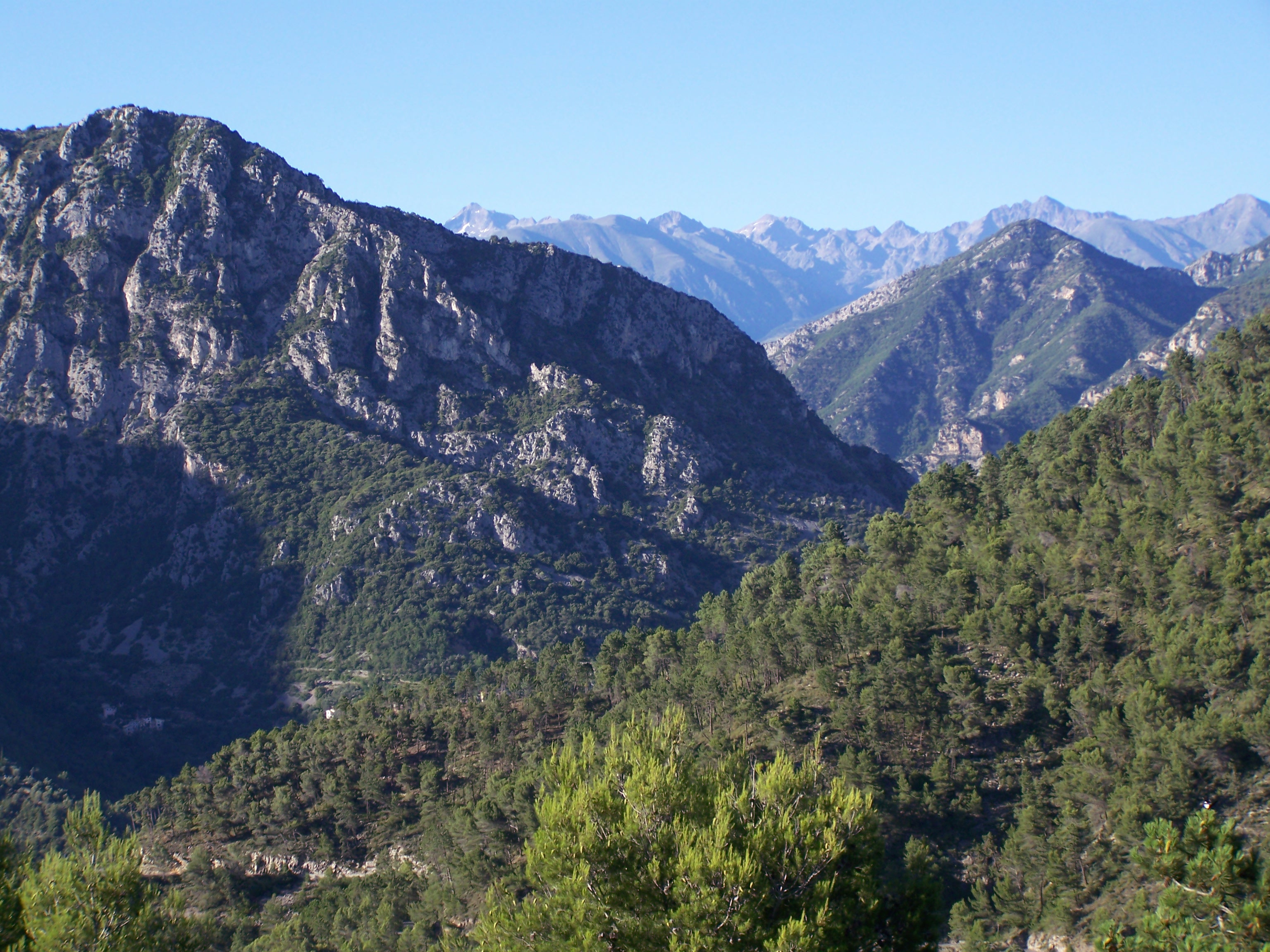 Panorama septentrional du village de Levens (Alpes-Maritimes, France) avec la vallée de la Vésubie et en arrière-plan les montagnes de la frontière franco-italienne